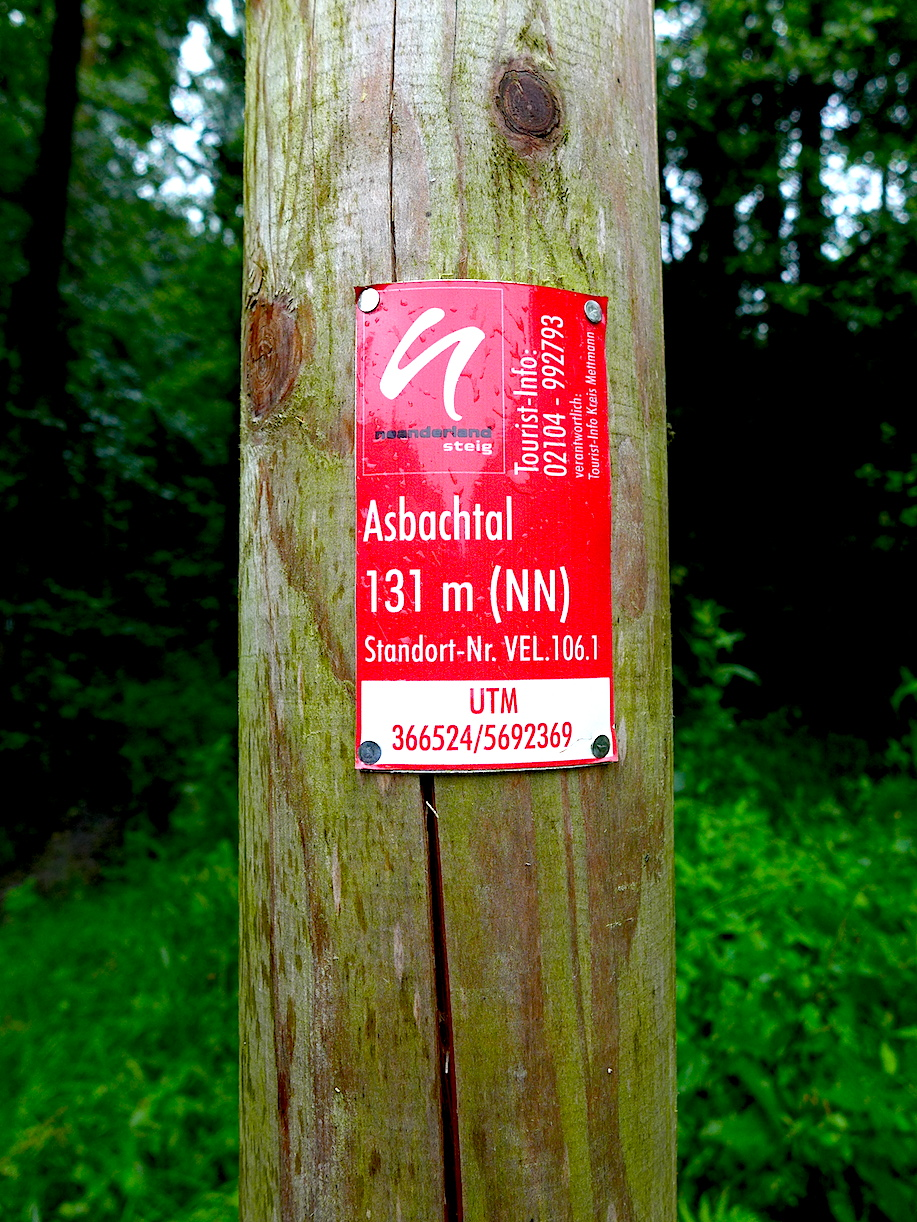 Этап "Ниренхоф-Фельберт" маркированного турмаршрута "Тропа Неандерланд", Северный Рейн-Вестфалия, Германия.